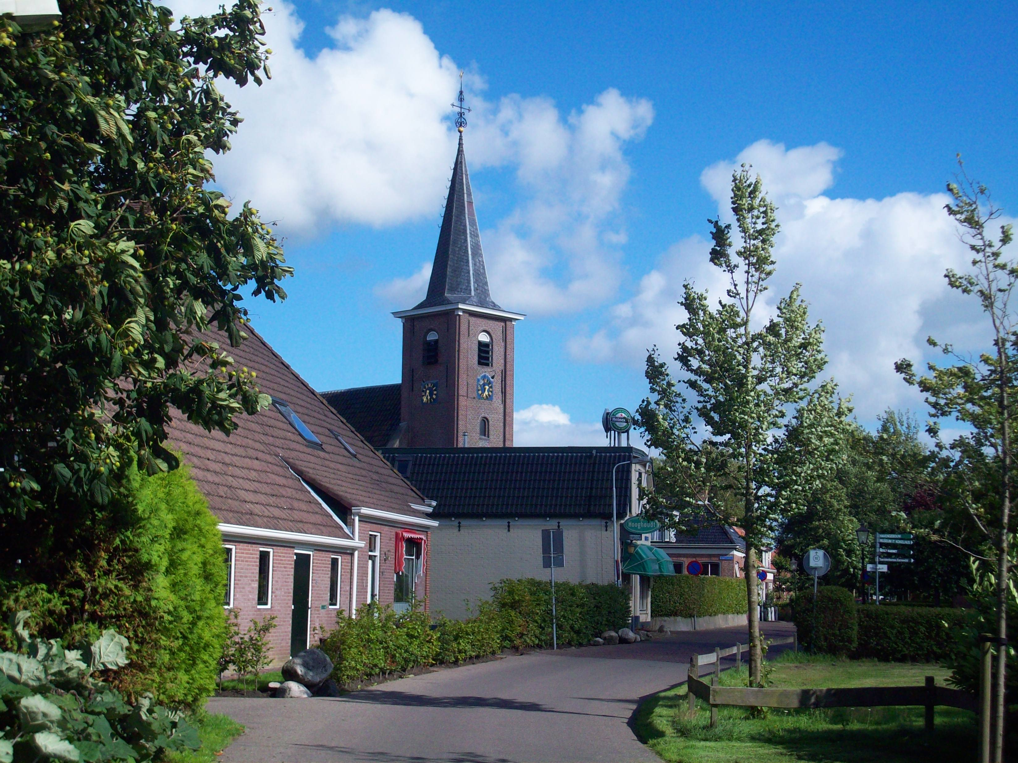 Eernewoude